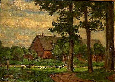 Gut Huntlosen